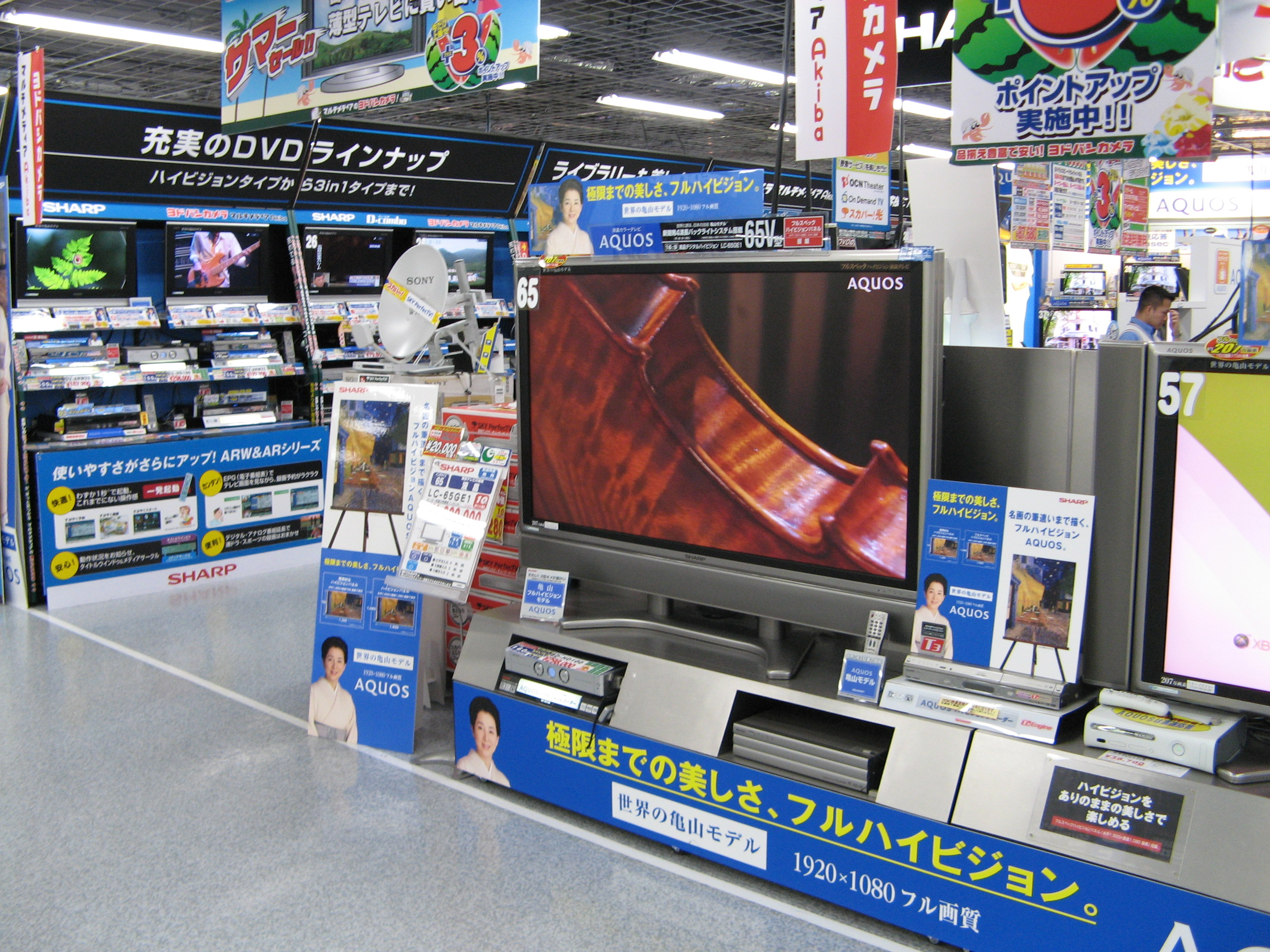 Akihabara: Yodobashi